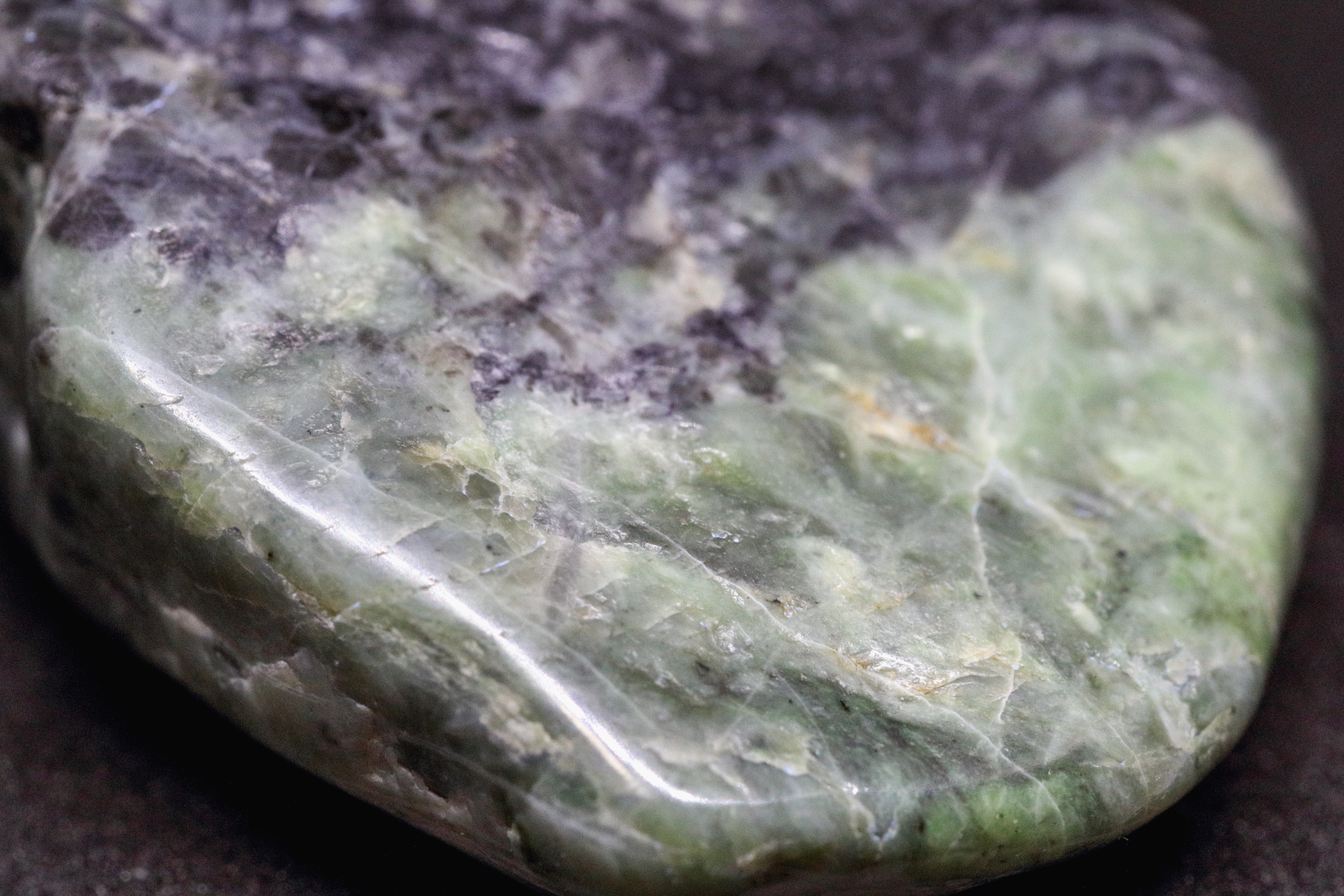 新潟県糸魚川市で採取されたヒスイ輝石（鑑定：フォッサマグナミュージアム学芸員）